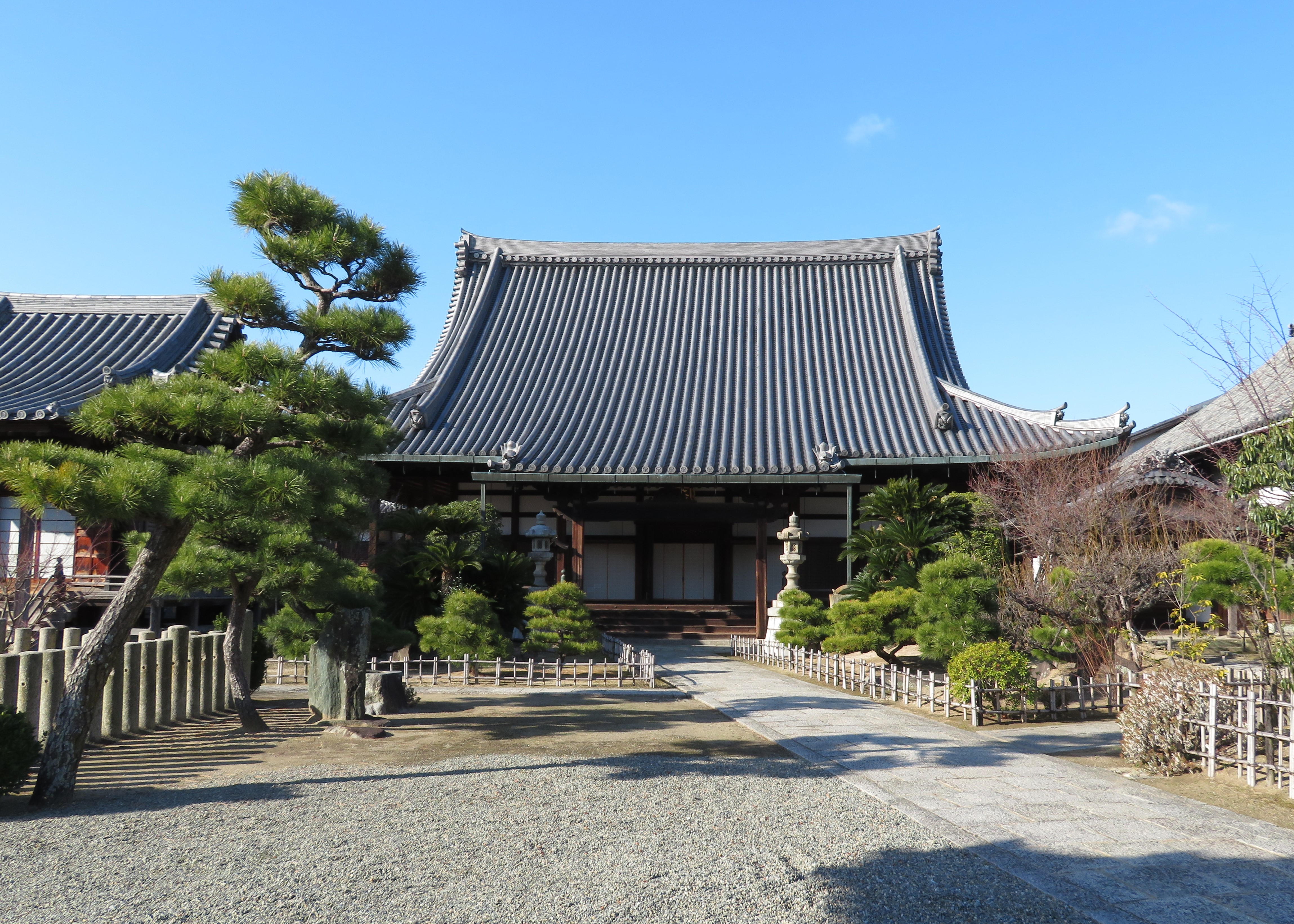 大覚寺 (姫路市)